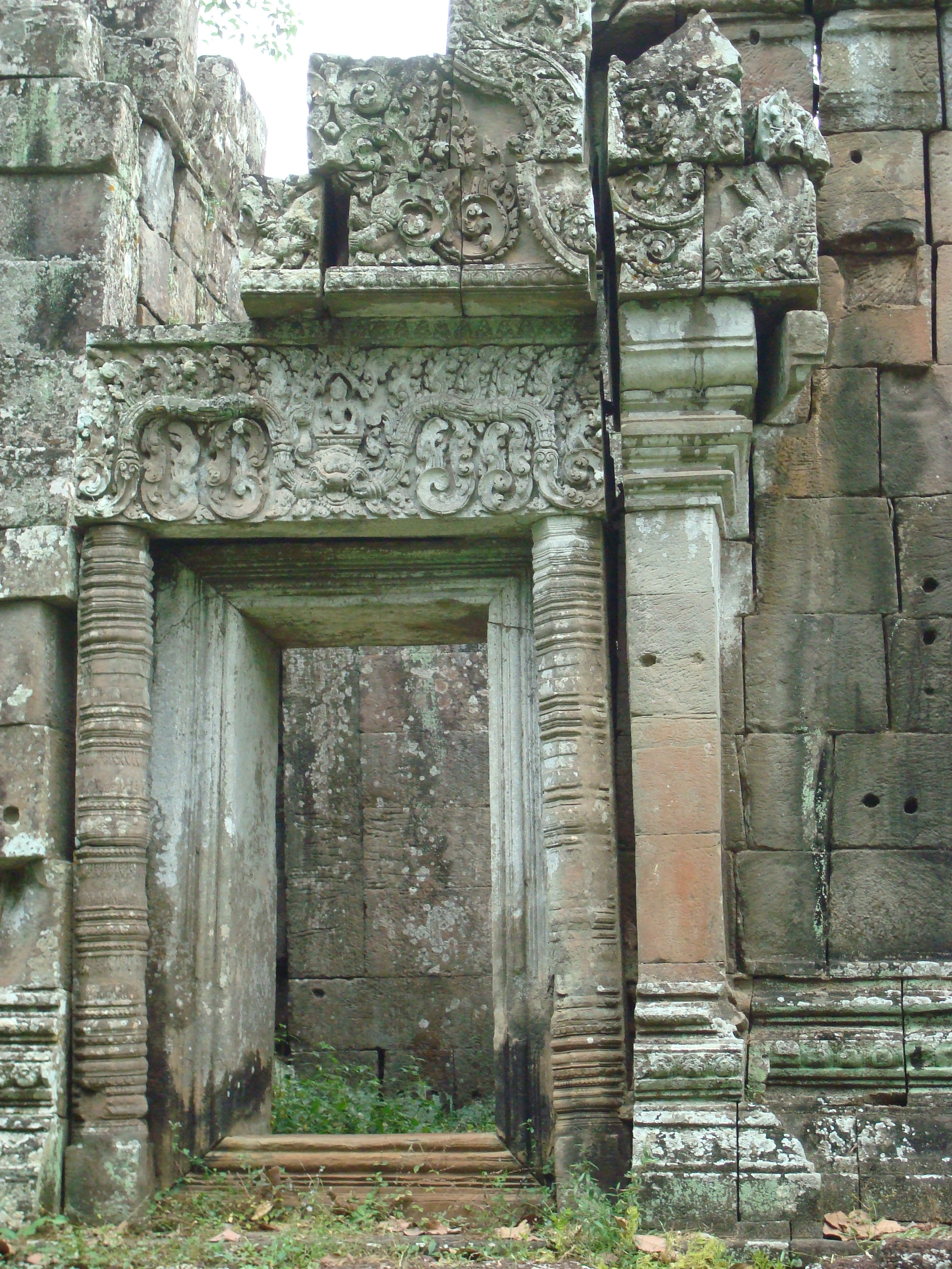 Türsturz im südlichen Khleang